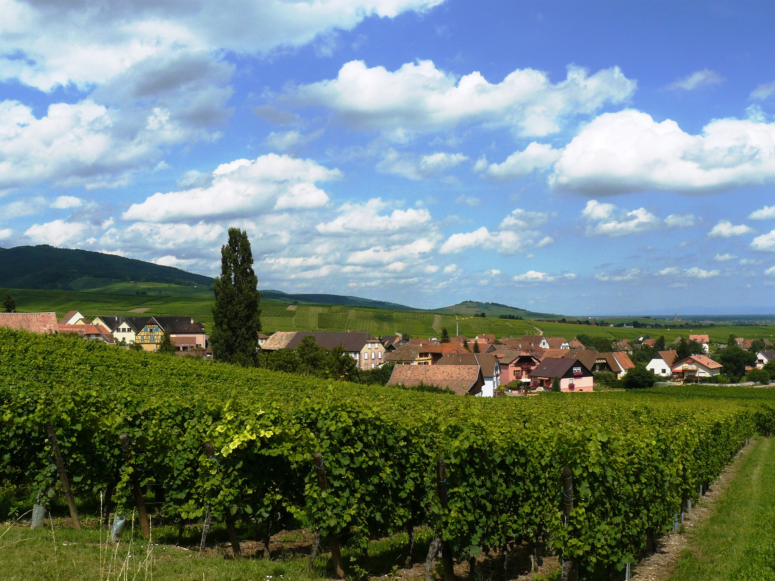 Une partie du village de Hunawihr